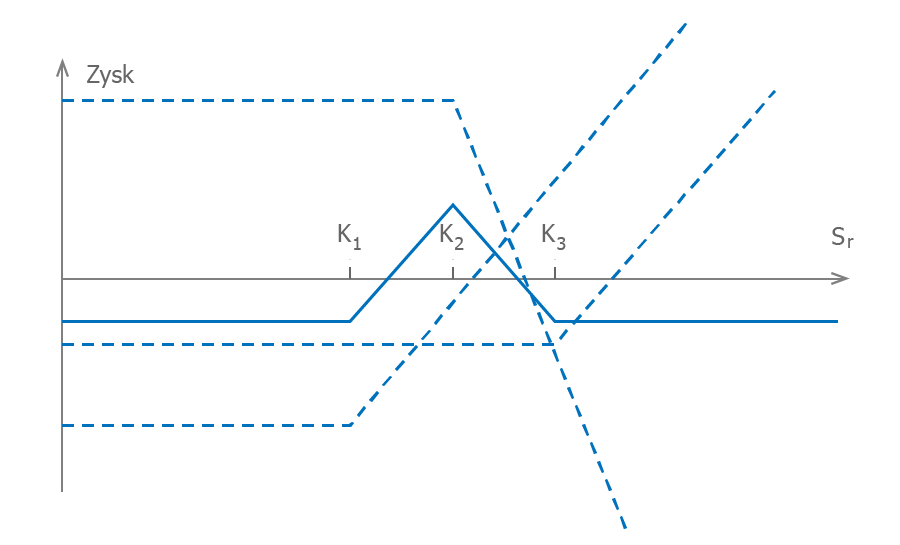 Strategia opcyjna butterfly